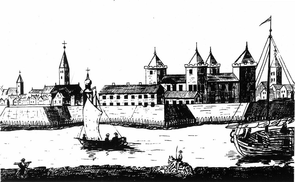 Ordensburg Mitau (Jelgava) 1703